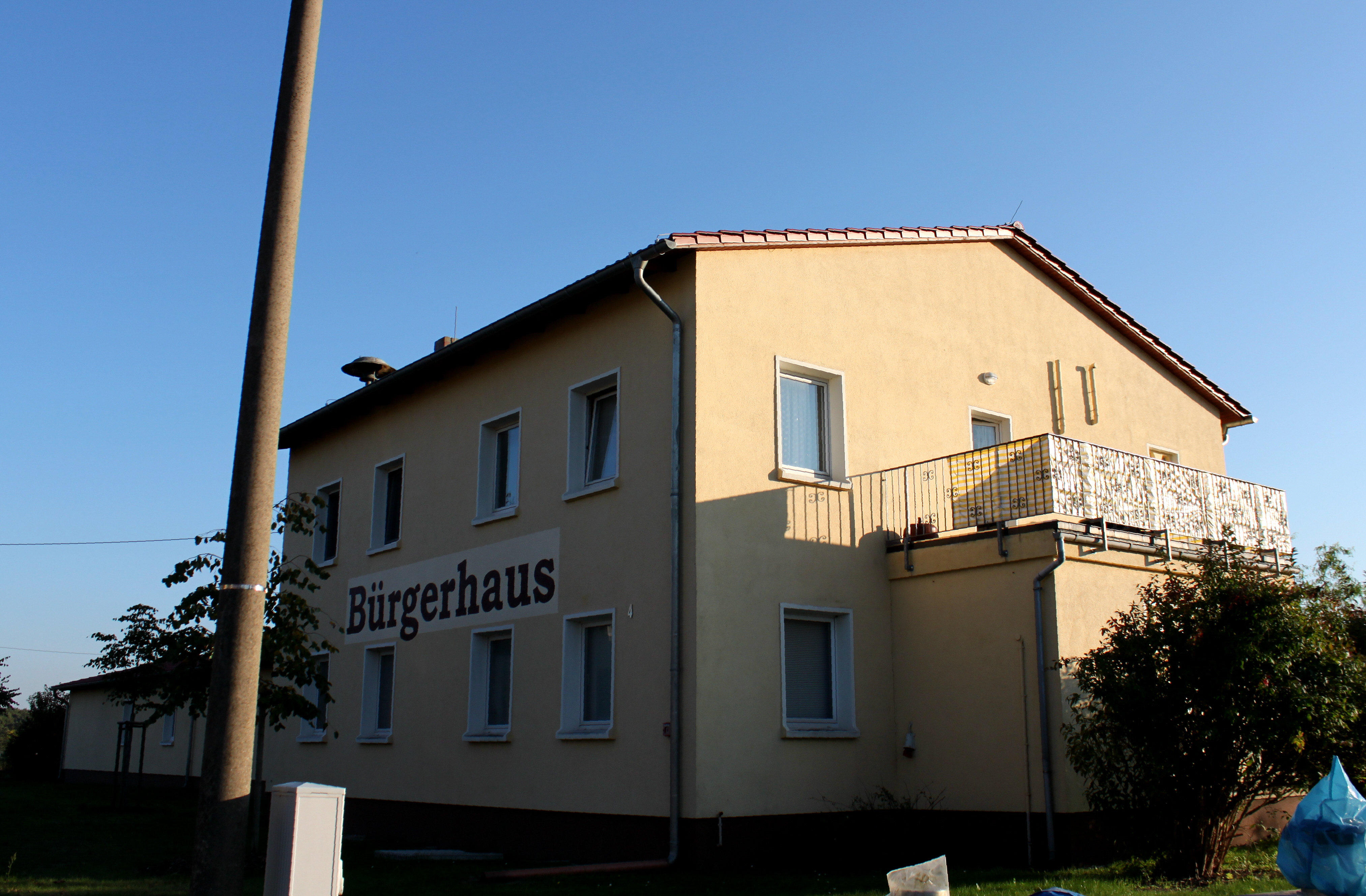 Haida